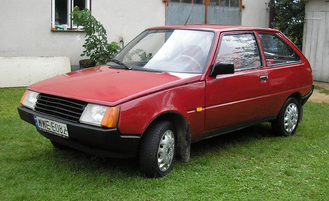 ZAZ Tavria - Starawieś woj. mazowieckie